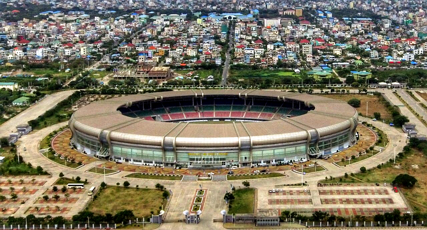 မြန်မာဘာသာ: မန္တလာသီရိ အားကစားကွင်း (မန္တလေး)